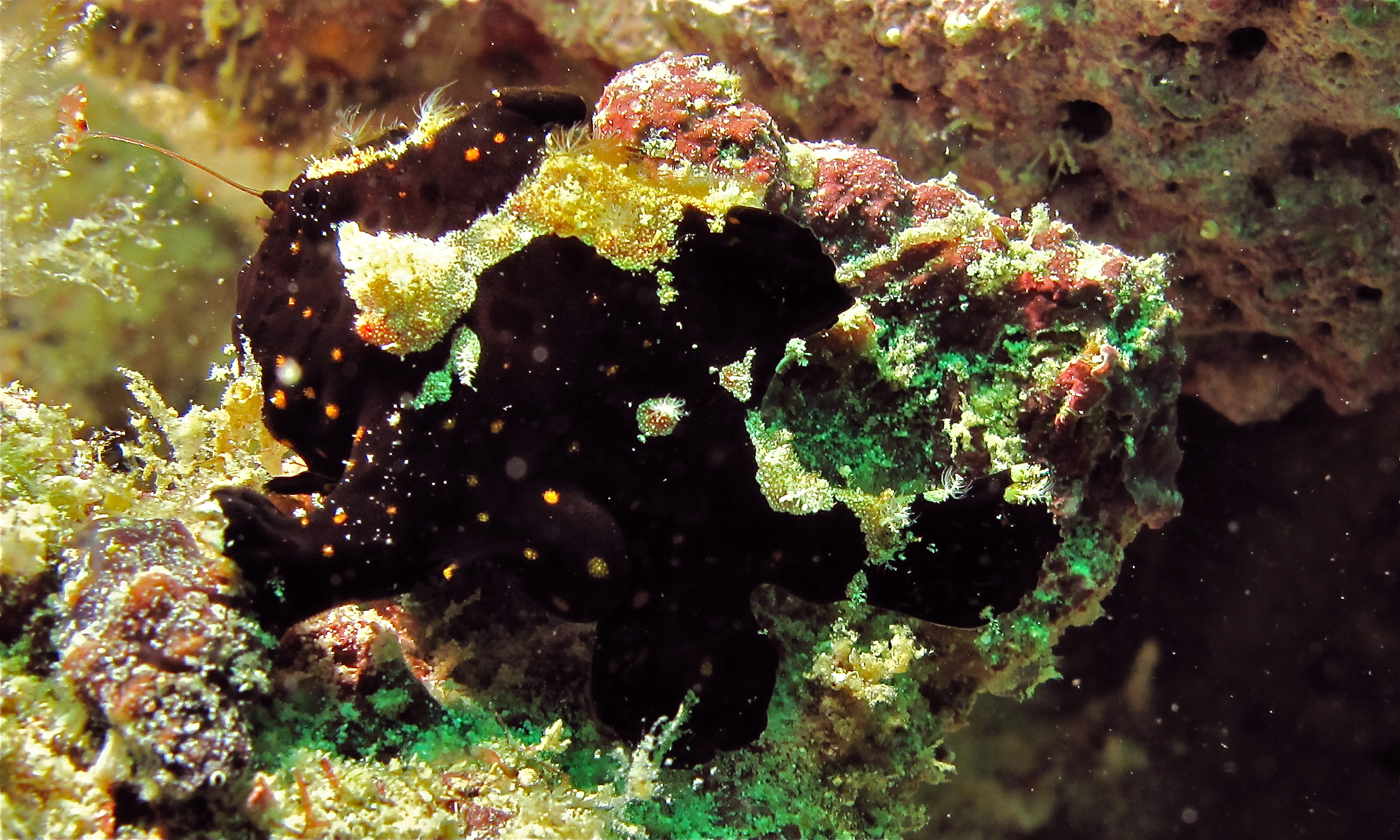 House Reef, Kapalai Island, Sabah, MALAYSIA